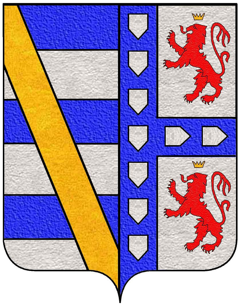 Arme Famiglia Massimo